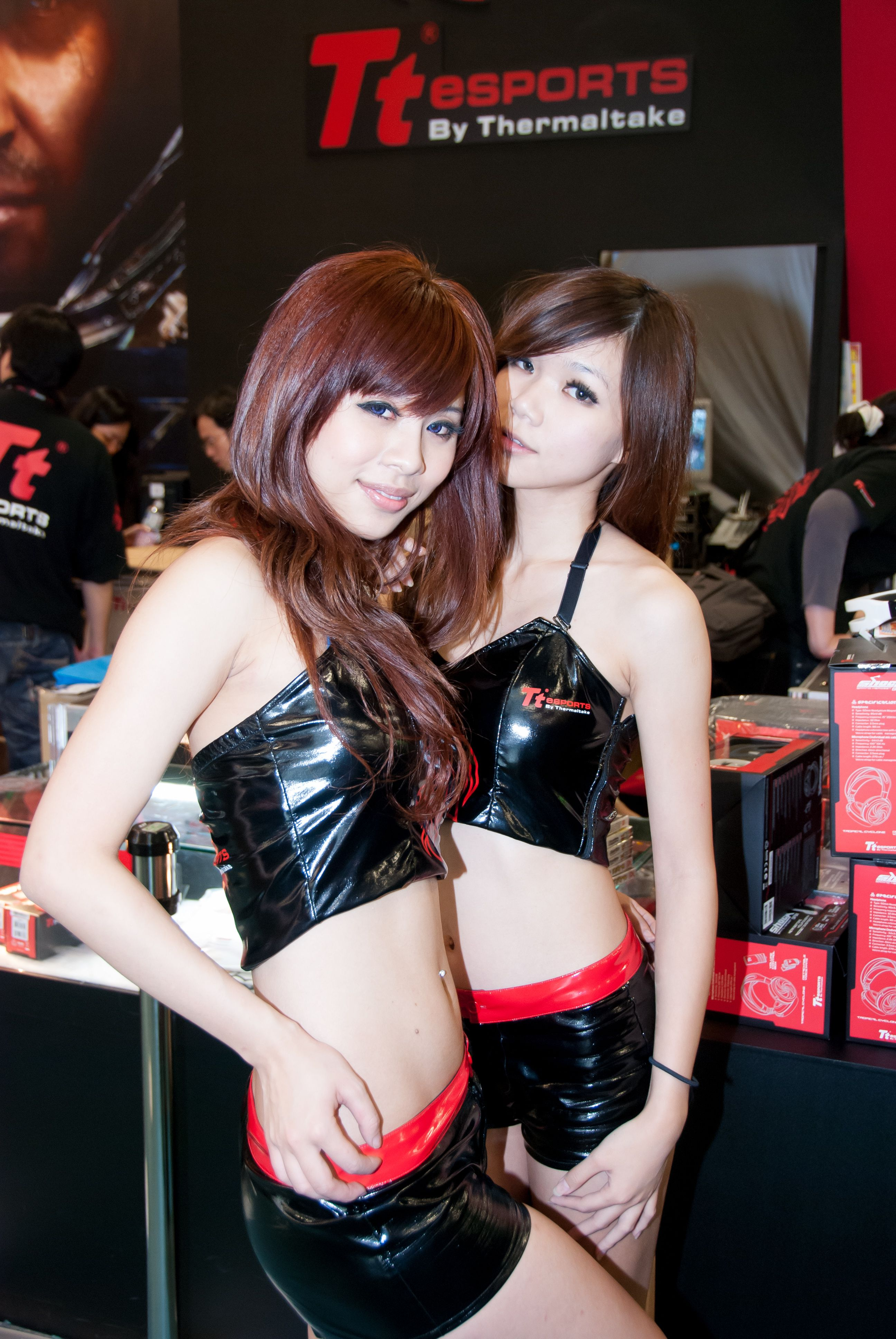 2011年臺北國際電玩展，曜越科技宣傳模特兒。